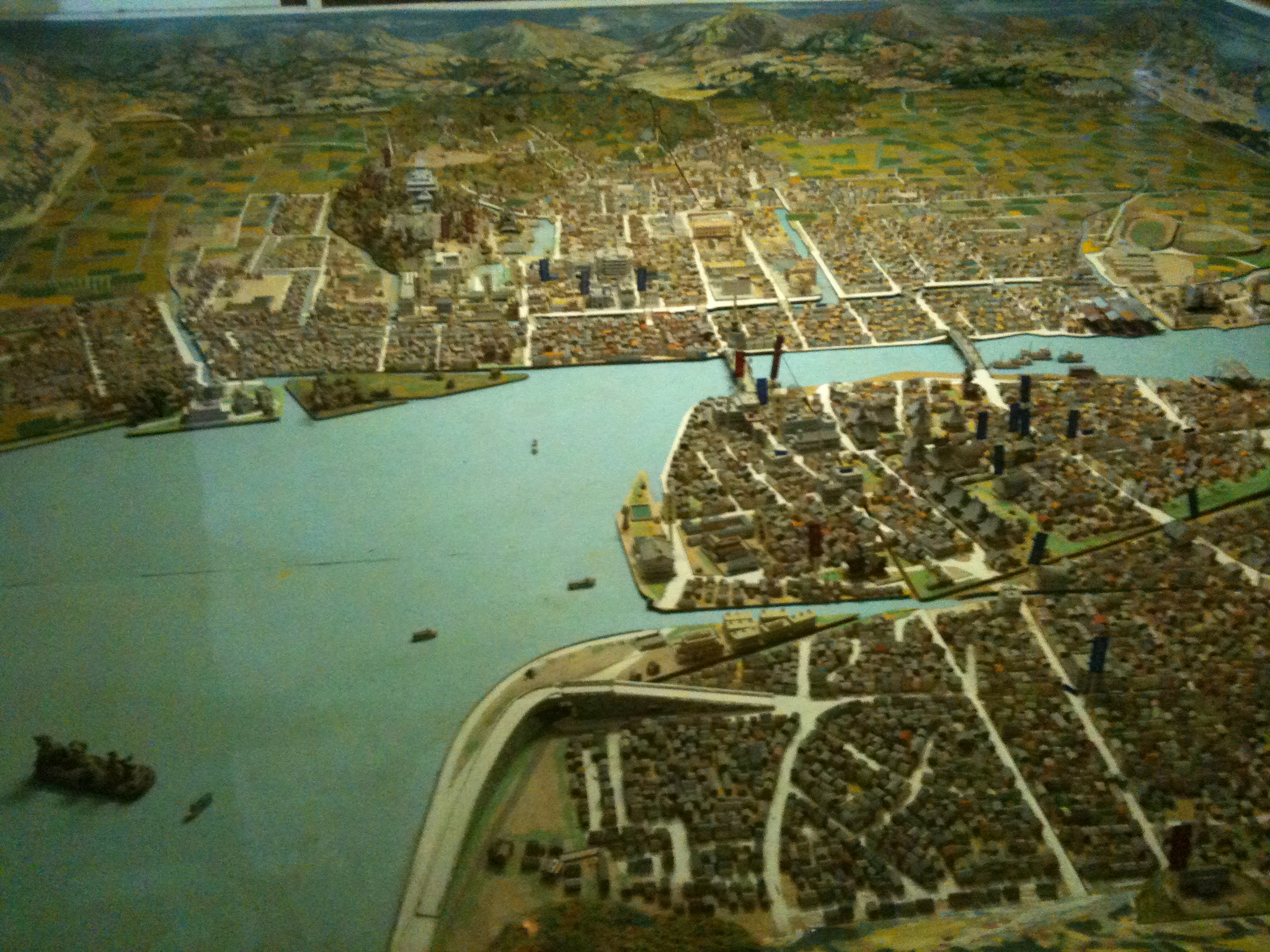 Château de Matsue au Japon, maquette de la ville basse.